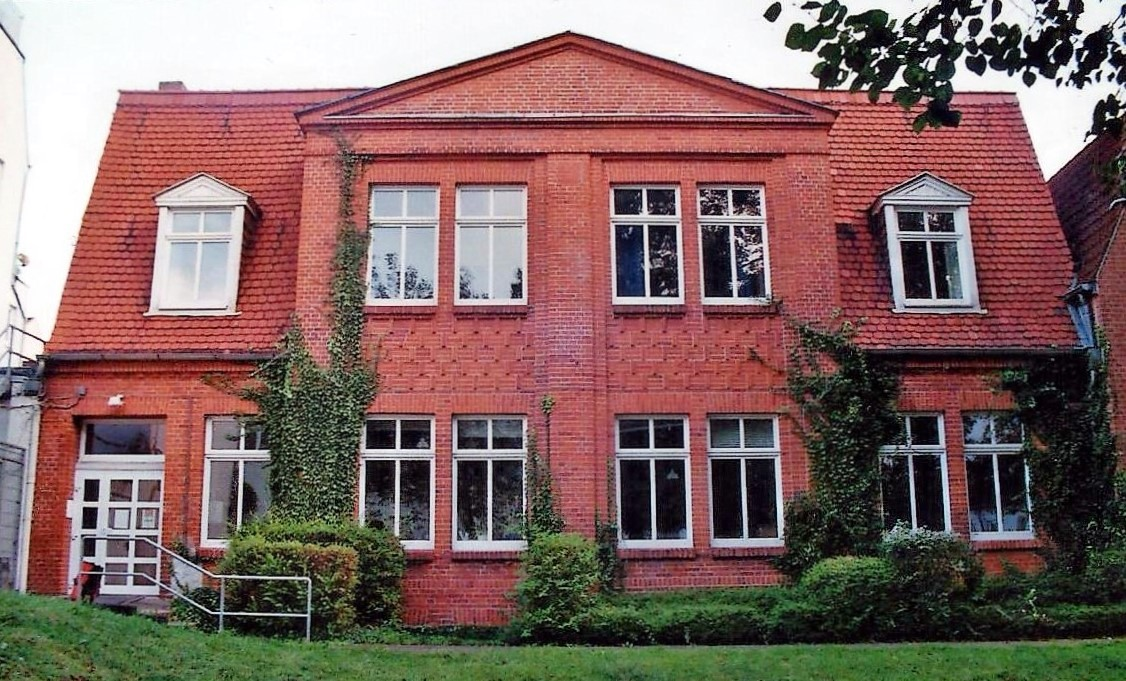 Erstes Gebäude des CVJM in Lübeck. Vorabversion